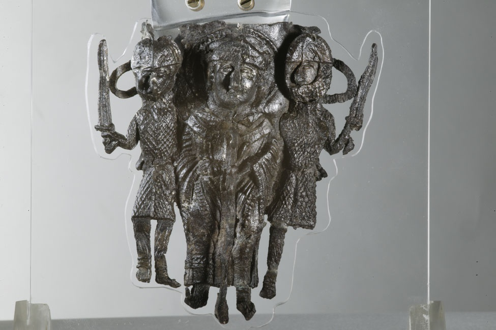 Pelgrimsampul Canterbury, 1175-1200 RMCC m448 Op deze tinnen pelgrimsampul staat Thomas Becket tussen twee van zijn belagers afgebeeld. In dergelijke flesjes namen pelgrims iets vanuit het heiligdom mee naar huis. Bijvoorbeeld aarde waarover het bloed van de heilige heeft gestroomd, water uit een nabijgelegen bron of een stukje stof dat in contact is geweest met de heilige.